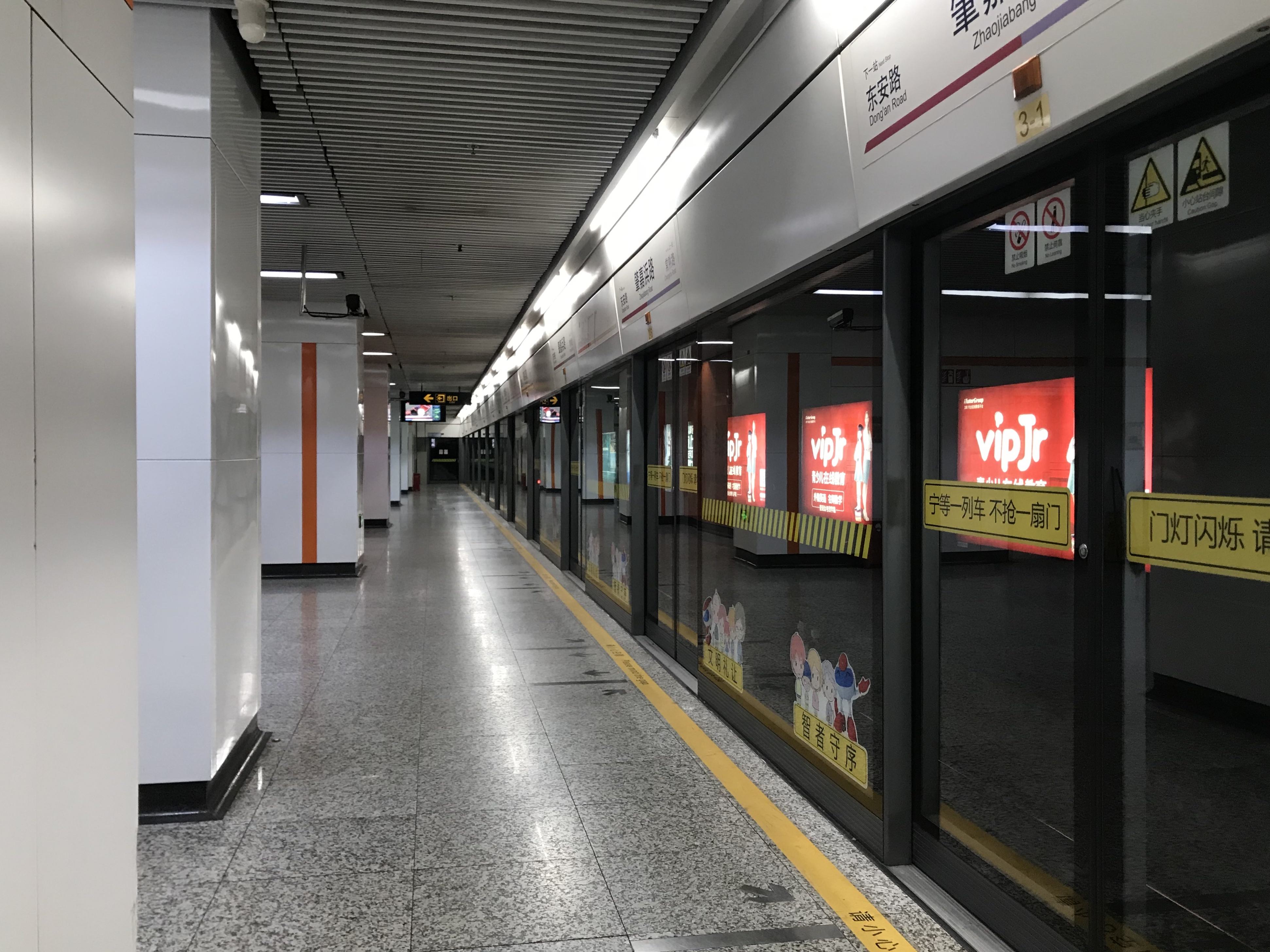 肇嘉浜路駅(上海地下鉄7号線)のホーム